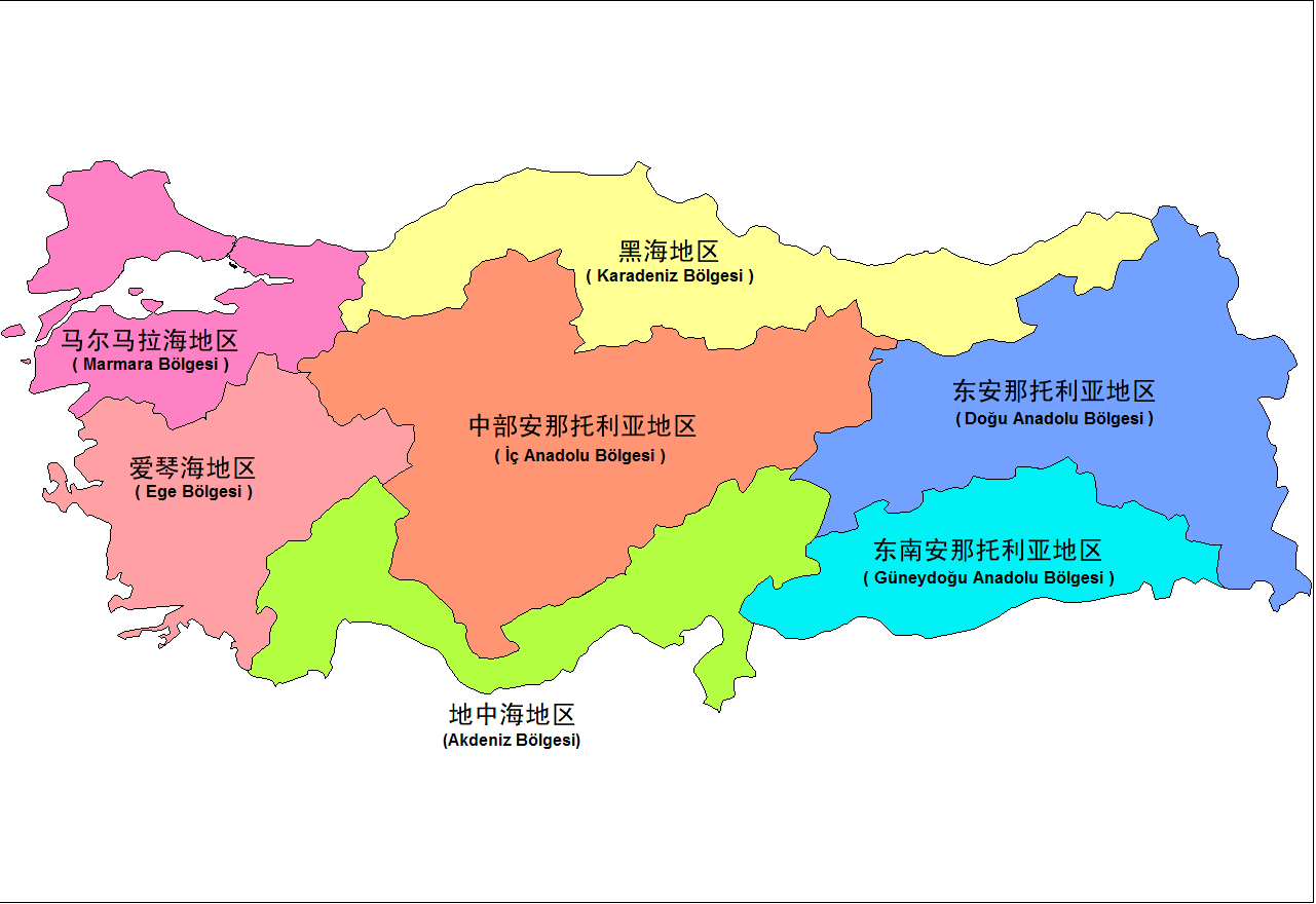 土耳其地区图。